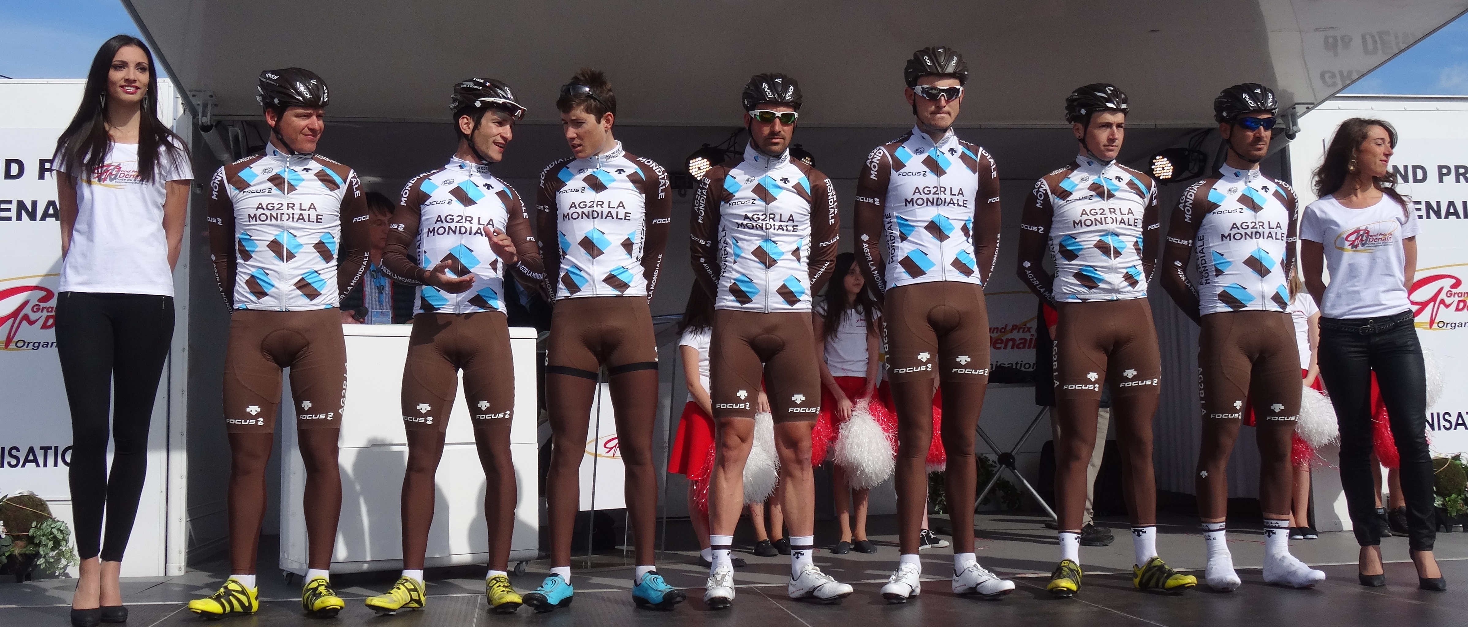 Reportage réalisé le jeudi 17 avril à l'occasion du départ et de l'arrivée du Grand Prix de Denain 2014 à Denain, Nord, Nord-Pas-de-Calais, France.